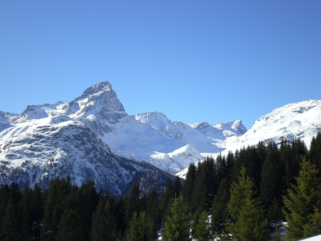 Piz PlattaRumantsch: Piz Platta